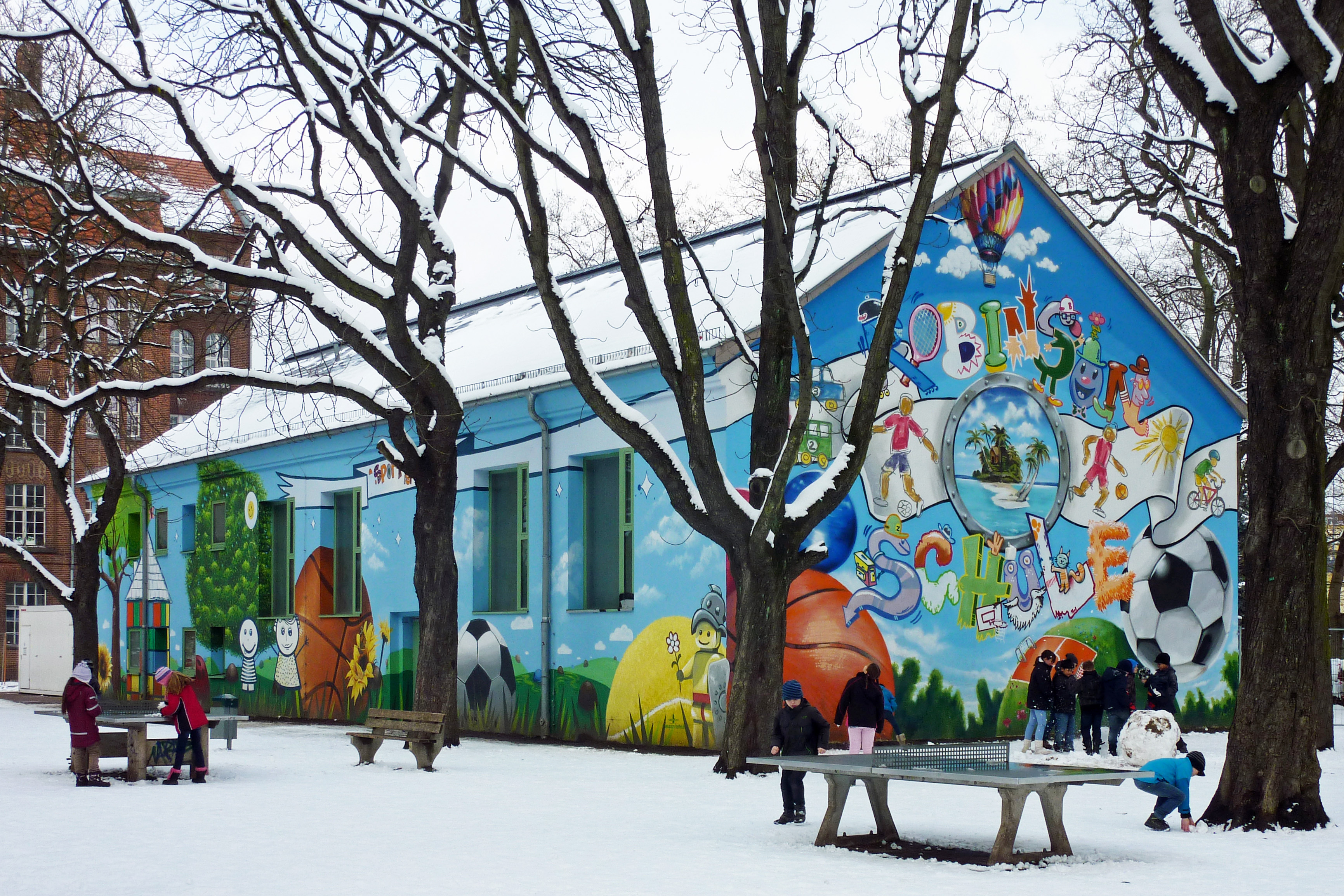 Nebengebäude mit Wandbild auf dem Schulhof der Robinson-Grundschule in Berlin-Rummelsburg.